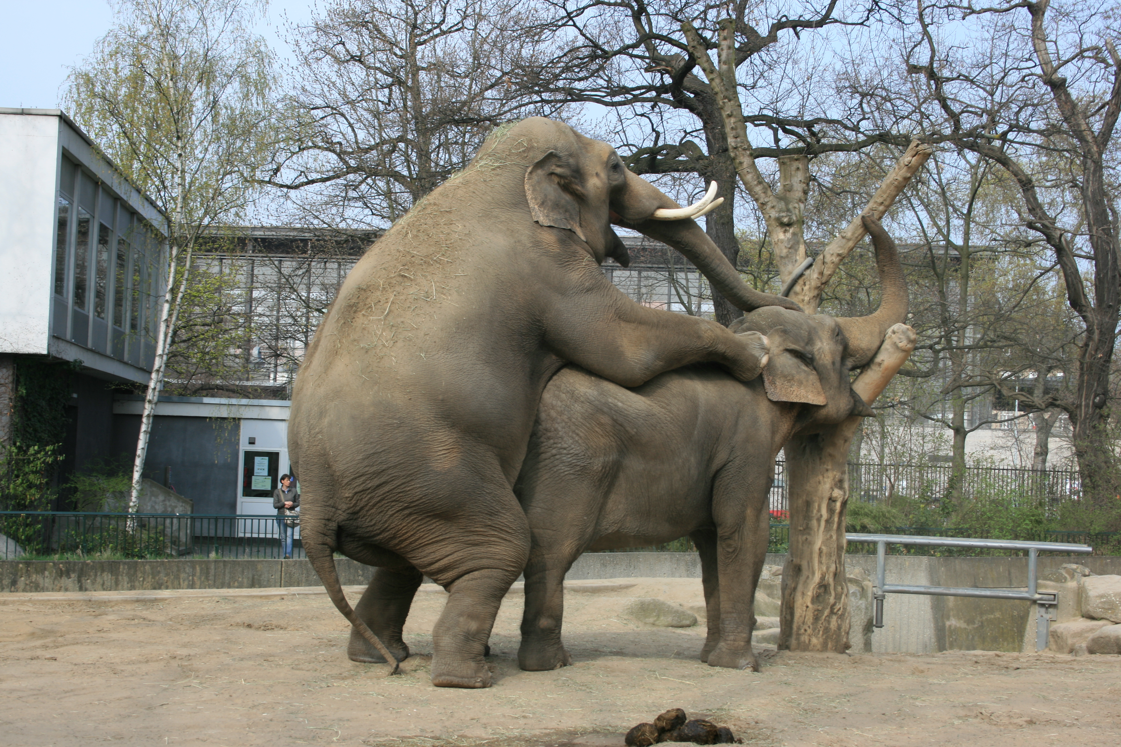 Zwei Elefanten im Zoologischen Garten Berlin beim Sex.